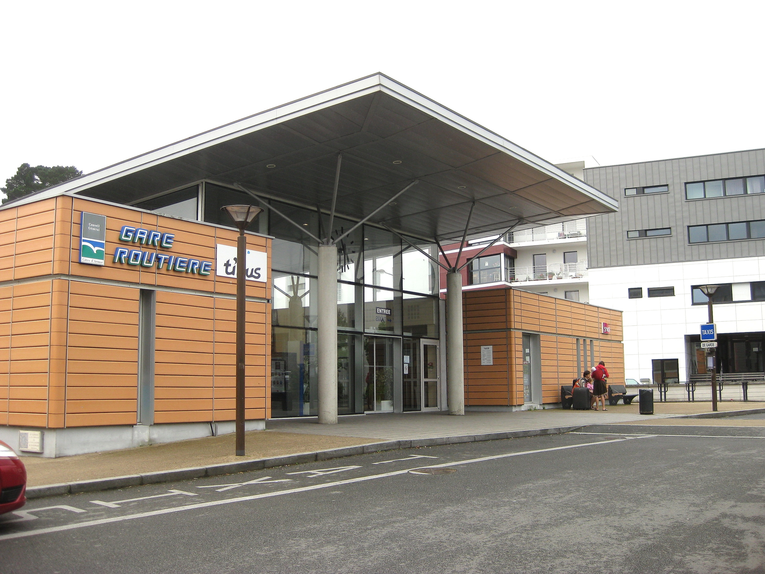 Le bâtiment voyageurs de la gare de Lannion vu côté parking